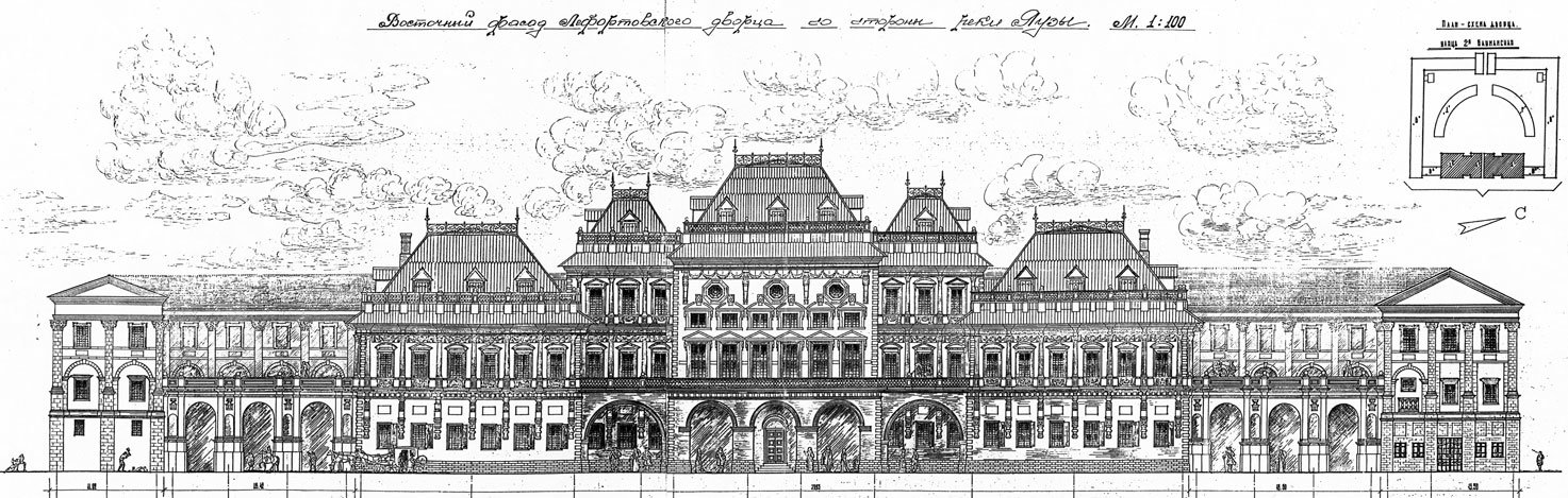 Фасады Петровского дворца на Яузе